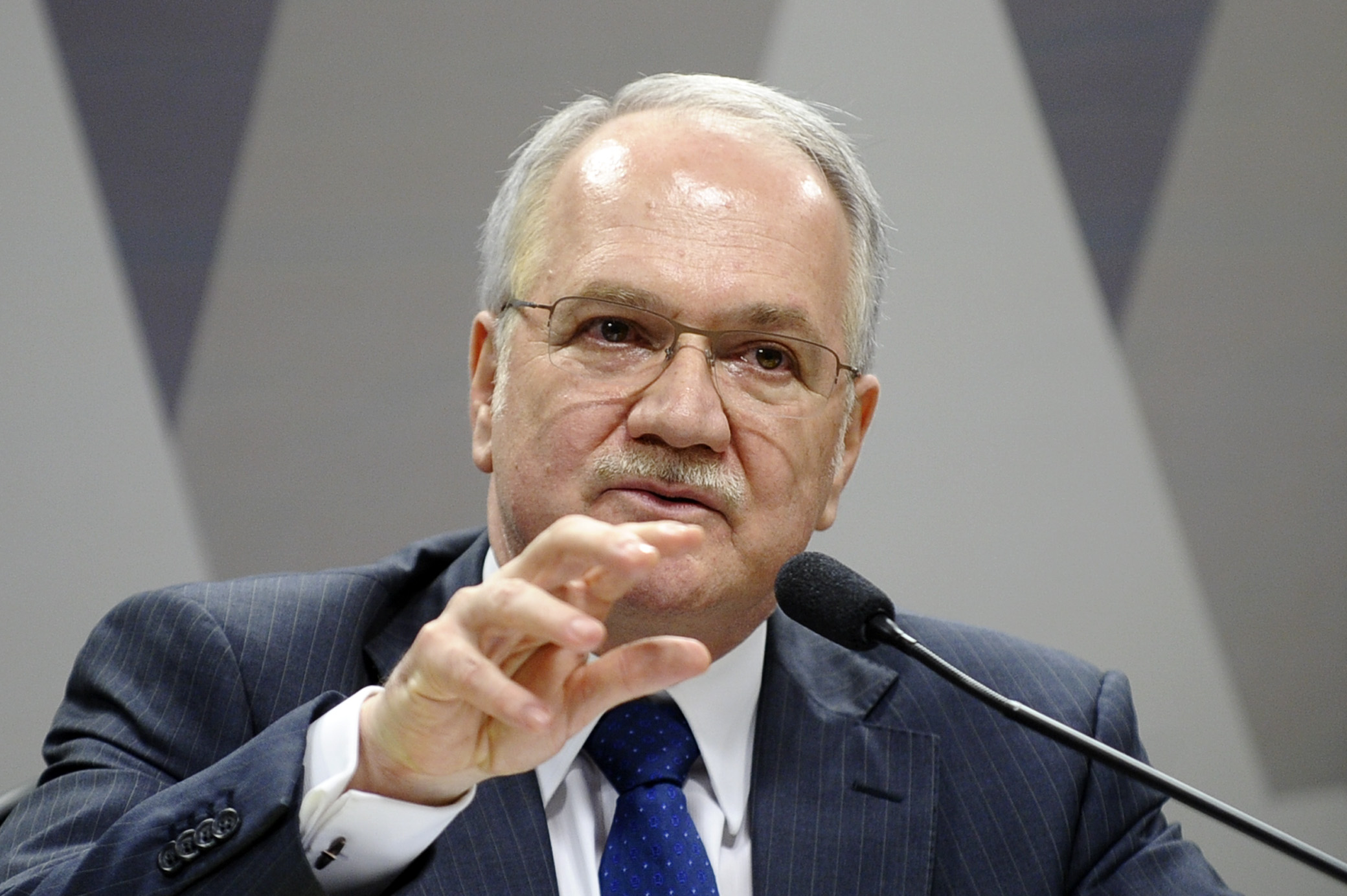 Sala de comissões do Senado durante a Comissão de Constituição, Justiça e Cidadania (CCJ) que realiza sabatina de Luiz Edson Fachin para exercer o cargo de Ministro do Supremo Tribunal Federal (STF) na vaga decorrente da aposentadoria do Ministro Joaquim Benedito Barbosa Gomes. Em pronunciamento, advogado Luiz Edson Fachin. Foto: Marcos Oliveira/Agência Senado